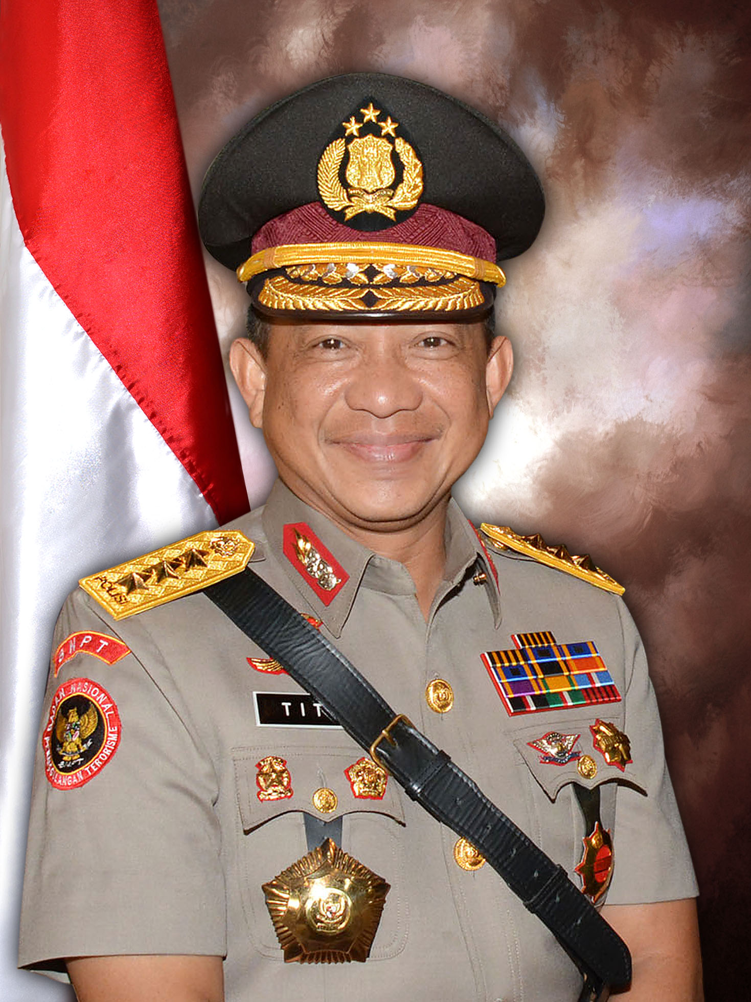 Tito Karnavian saat menjabat sebagai Kepala Badan Nasional Penanggulangan Terorisme. Pangkat saat difoto: Komisaris Jenderal Polisi Harap bagi yang memiliki hak cipta foto ini dan/atau dapat mengunggahnya secara resmi agar menghapus foto ini dan menggantinya dengan yang resmi.